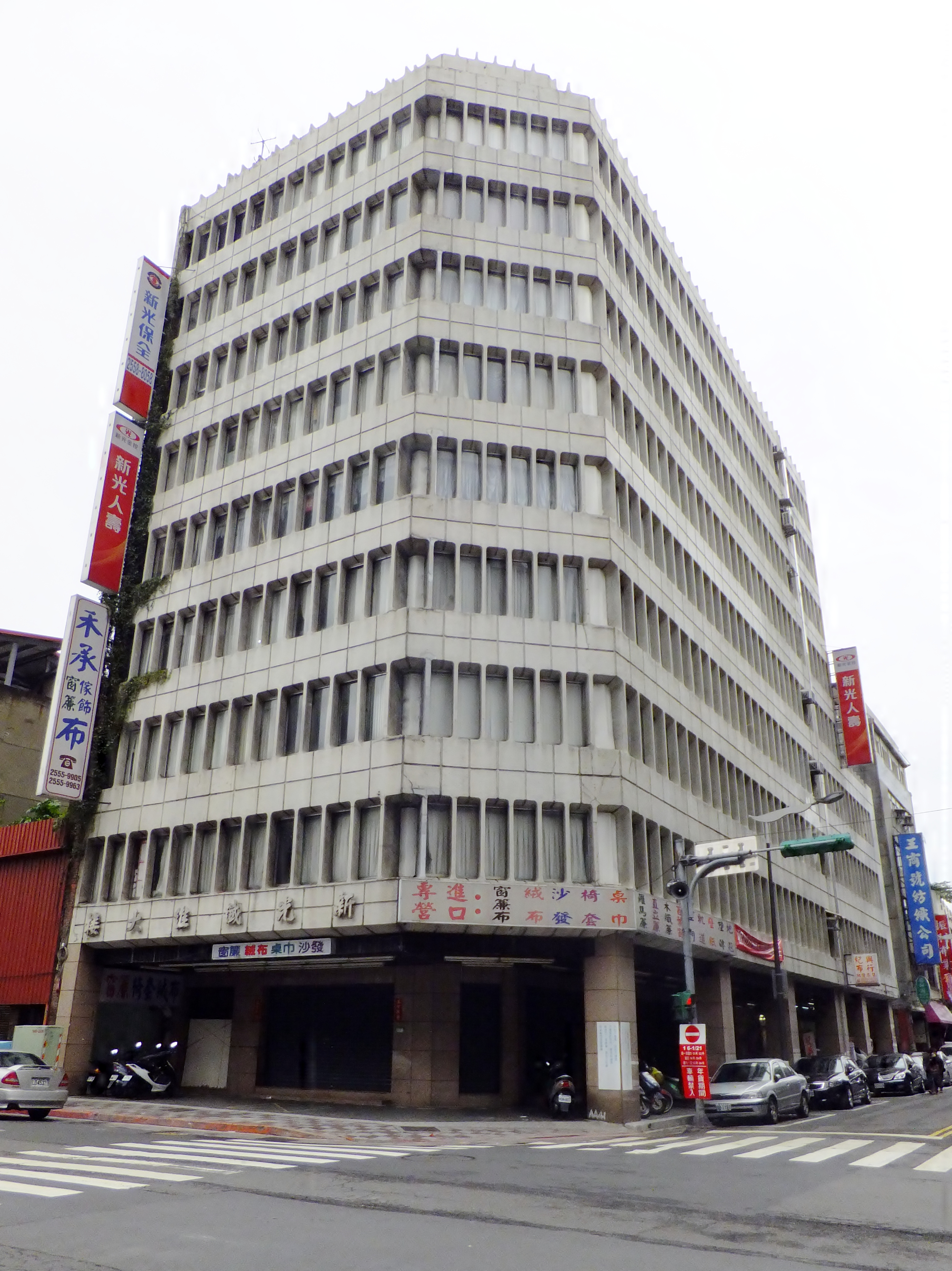 民國34年（1945）臺灣光復後，吳火獅與同鄉友人共創新光商行，從事布疋、茶、糖、麵粉等買賣，其故址即今之新光纖維大樓，是為新光集團發祥之地。地址：臺北市大同區南京西路217巷1號。